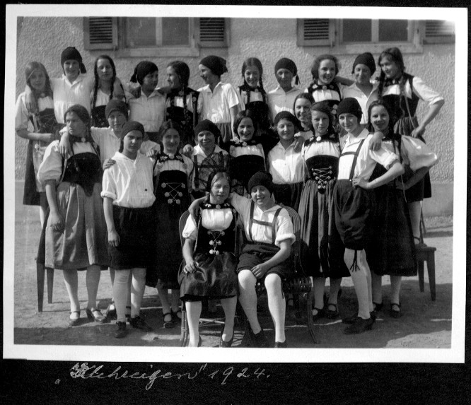 Switzerland 1924